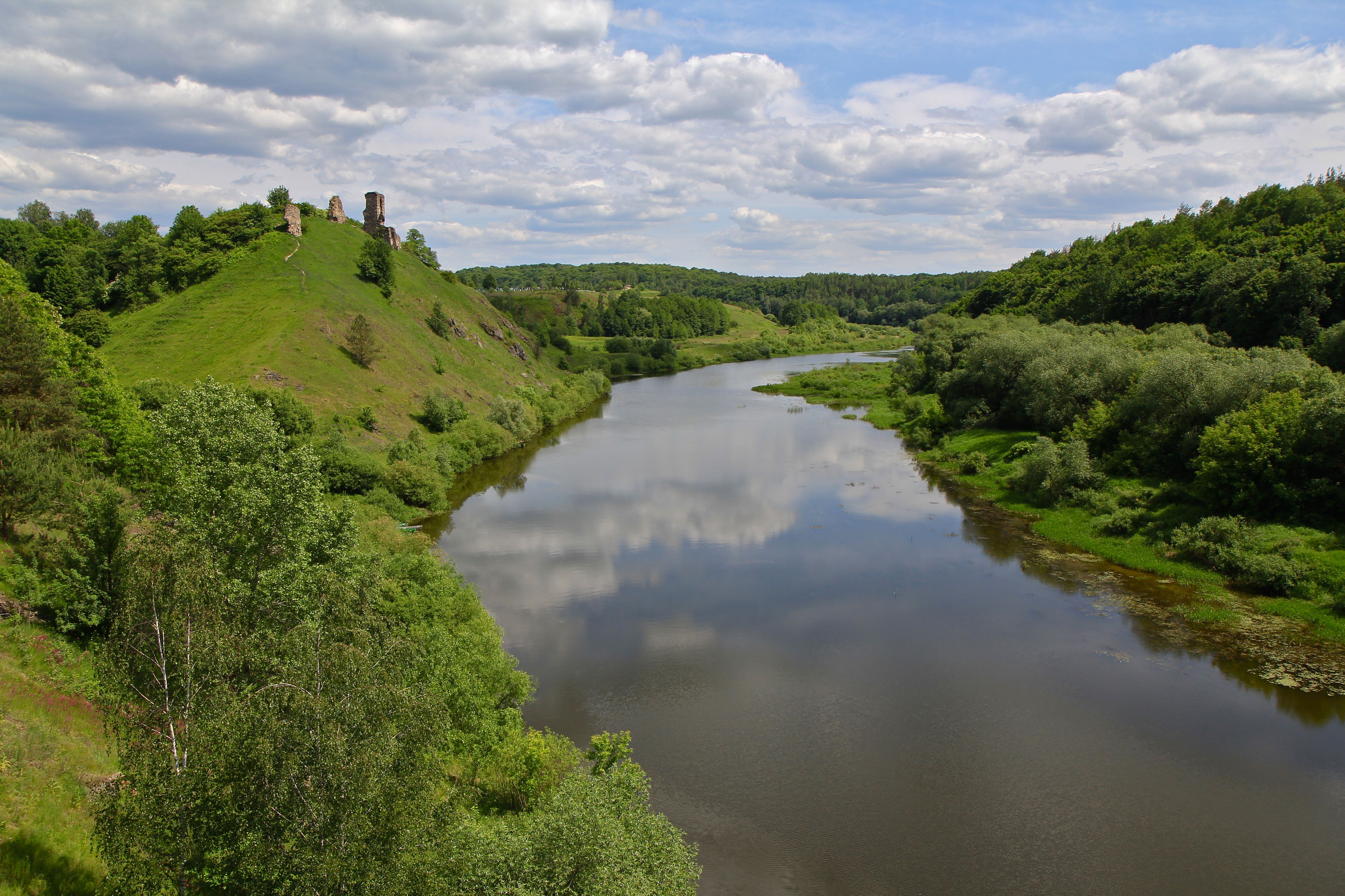 Губків і Случ